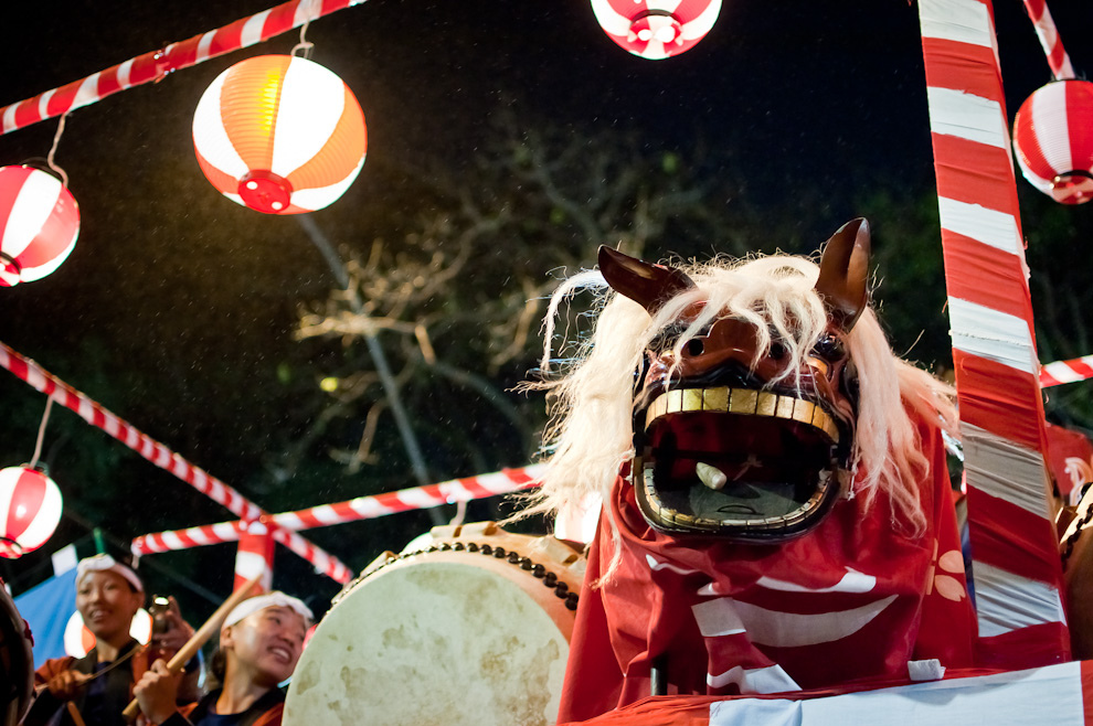 Una carroza de la comparsa Japonesa entretiene al público con un dragón durante el Desfile de representaciones de los pueblos originarios, inmigrantes, de carnavales de Paraguay y de naciones invitadas el sábado 14 de Mayo de 2011 sobre la Avenida Mariscal López.